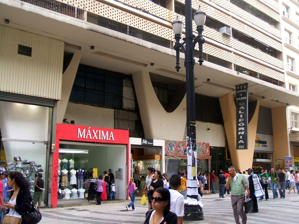 Entrada do Edifício Califórnia, projeto de Oscar Niemeyer (1951); na rua Barão de Itapetininga, centro da cidade de São Paulo, Brasil.